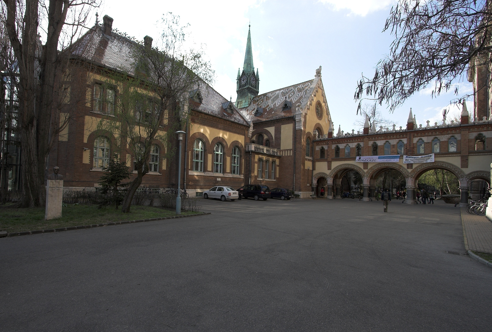 A BME könyvtárépülete az ún. sóhajok hídjával